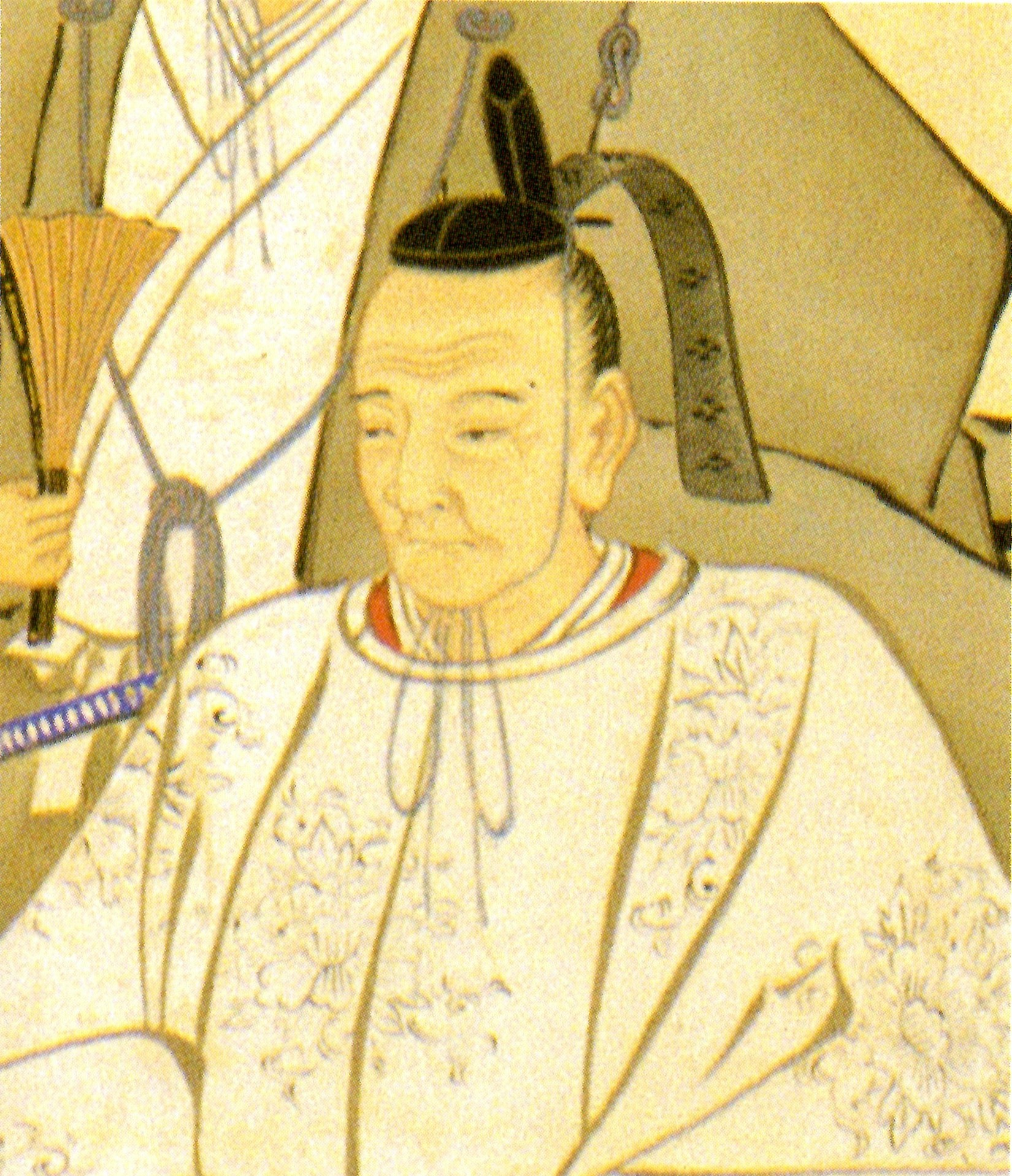 津軽順承の肖像。